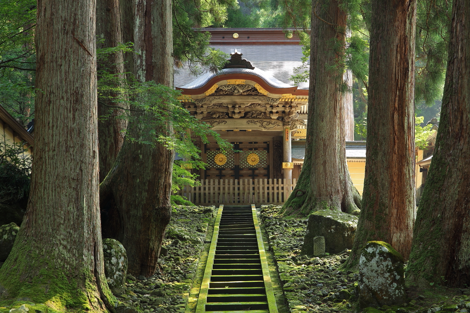 永平寺勅使門（永平寺町、2013年（平成25年）8月）